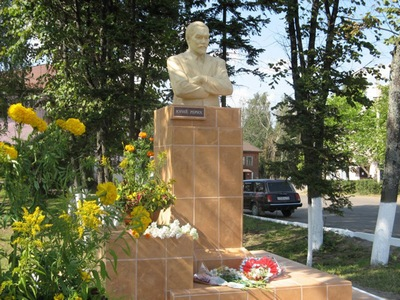 Памятник Юрия Рериха в Окуловке